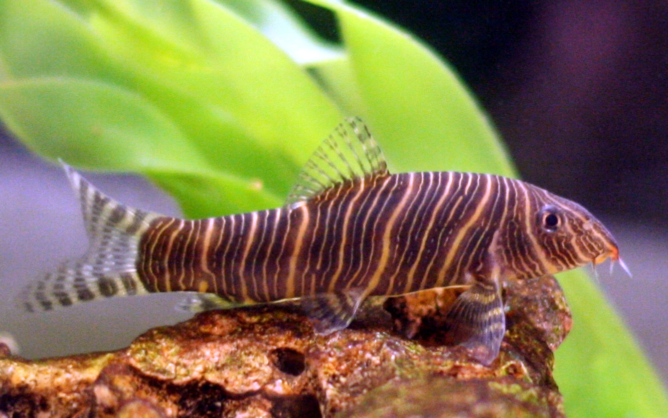 A zebra loach (Botia striata), size about 7cm.